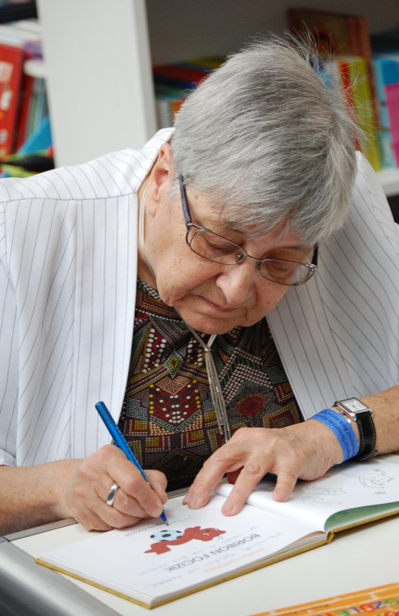 Marék Veronika dedikál a XXIII. Budapesti Nemzetközi Könyvfesztiválon